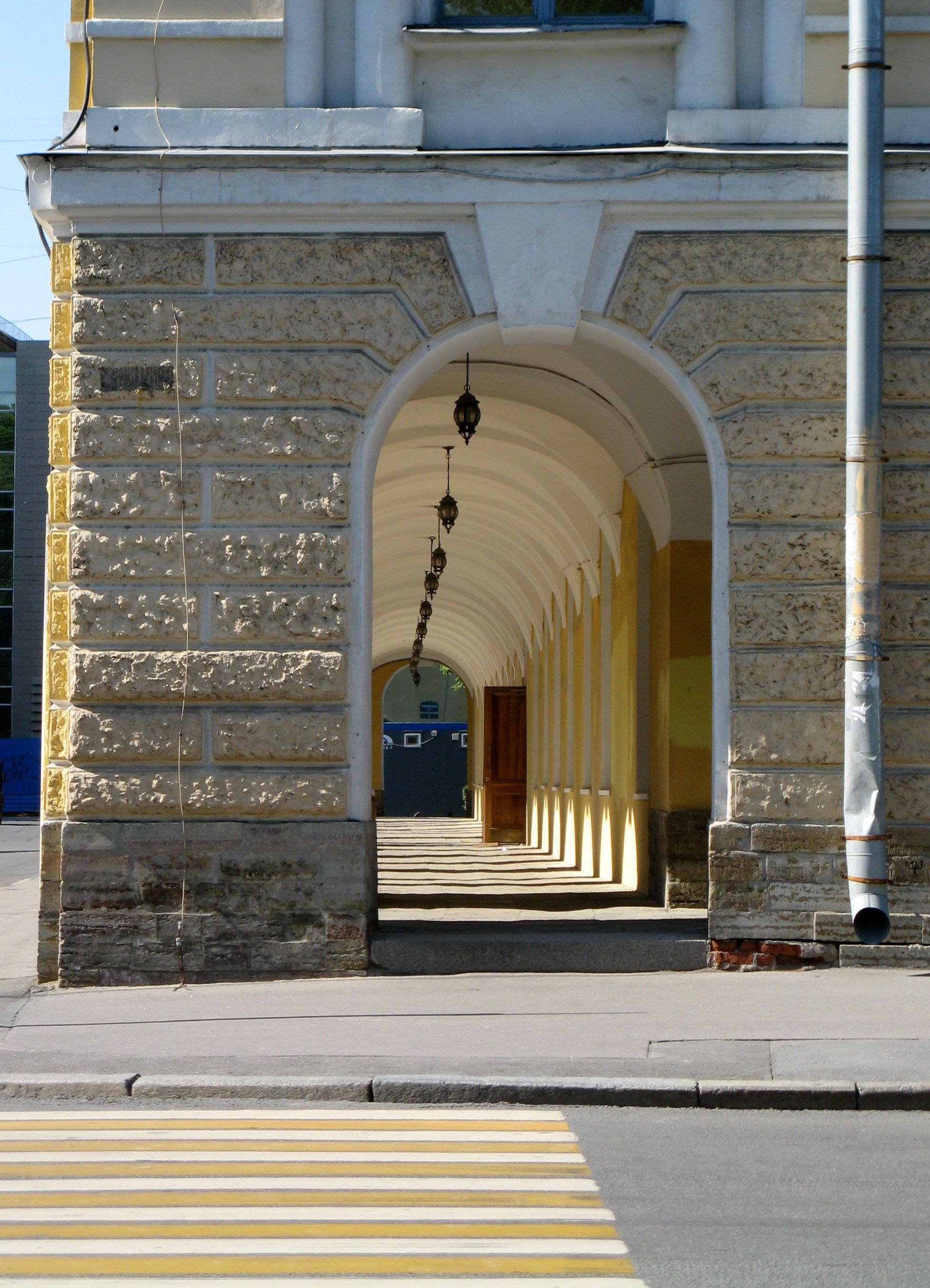 Гостиный двор Новобиржевой (Санкт-Петербург, Васильевский остров, Менделеевская линия, 5)